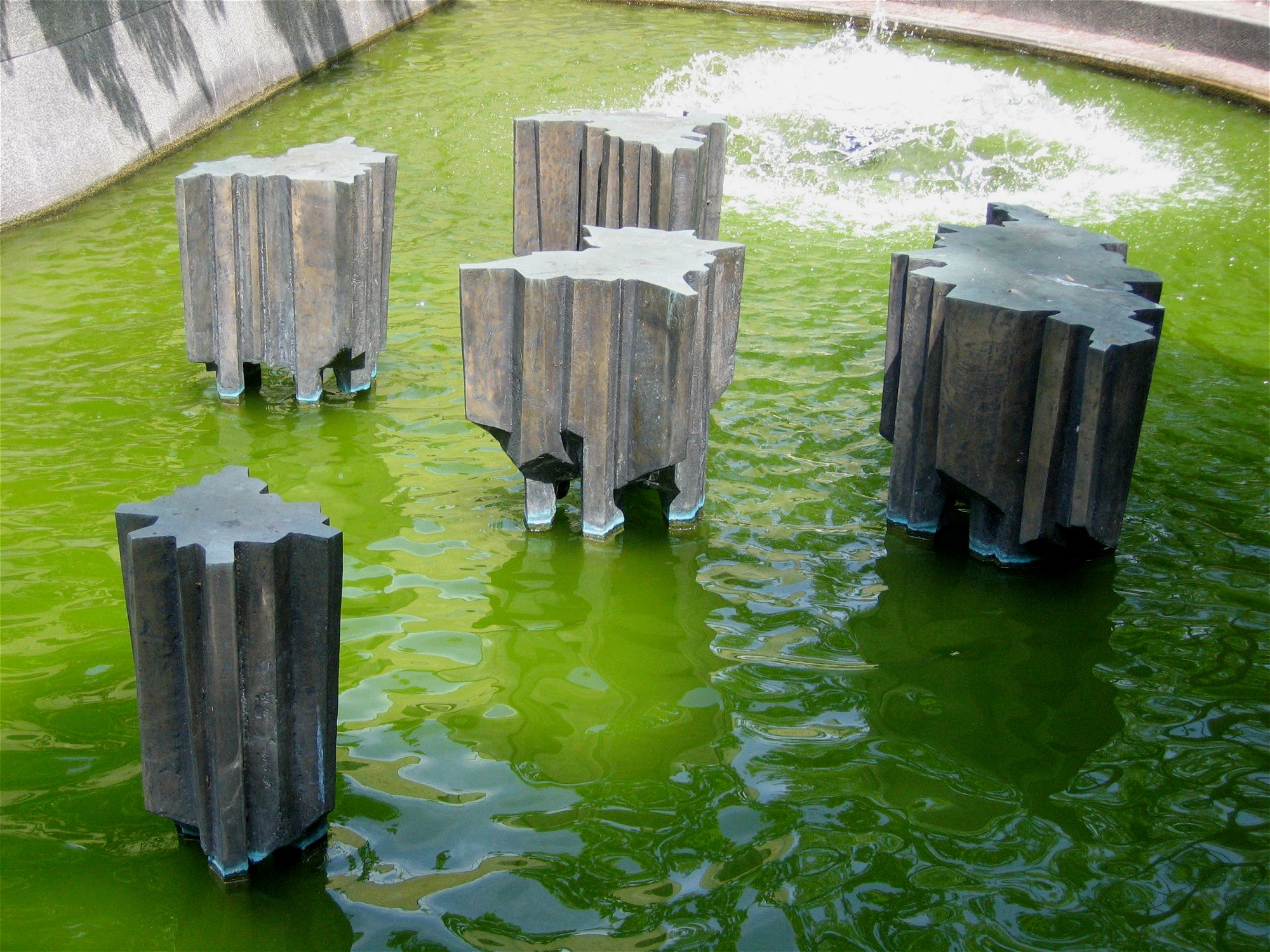 Georg Brenninger: Erdteile (1980); vor der Neuen Pinakothek in München